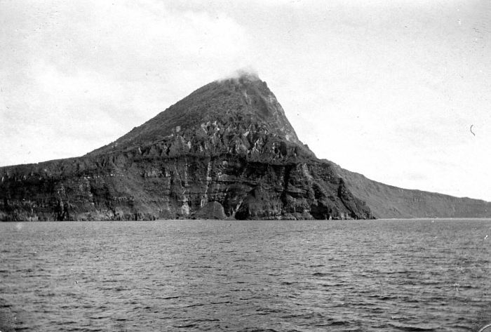 Repronegatief. De Krakatau, gezien vanuit zee